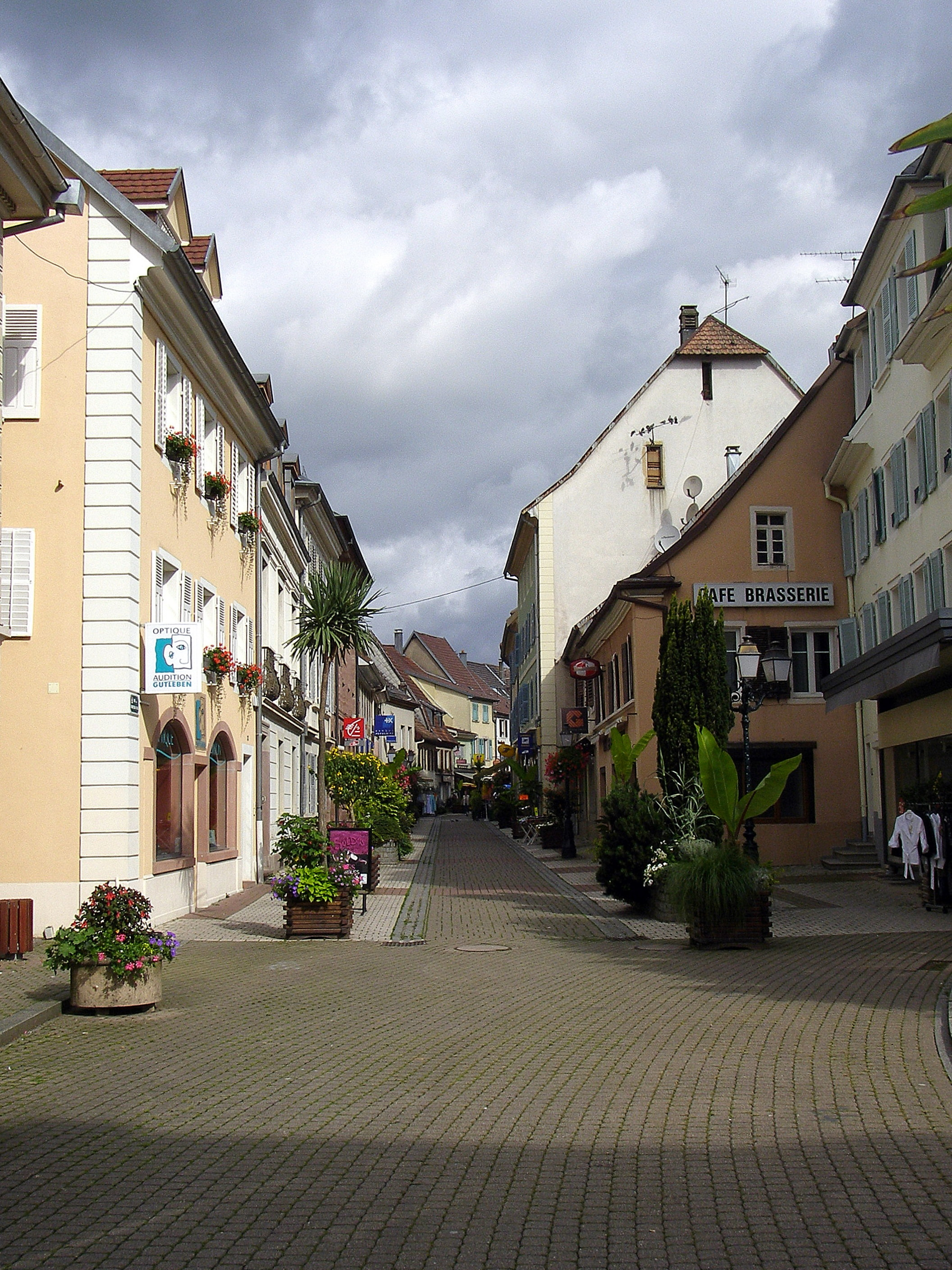 Une rue piétonne de Masevaux (Haut-Rhin, France)